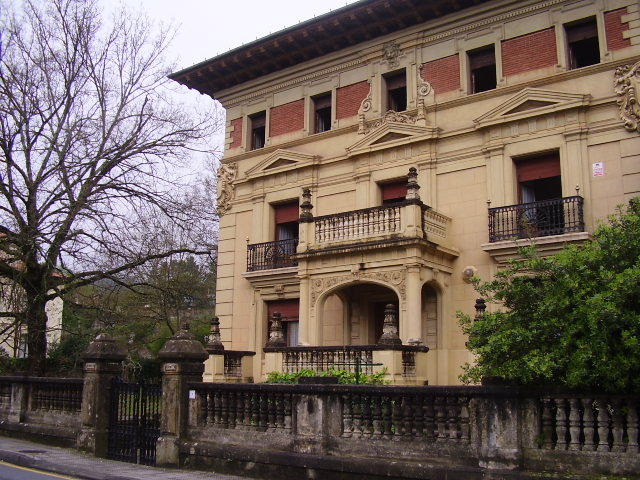 Villa Cuba, Gordexola.